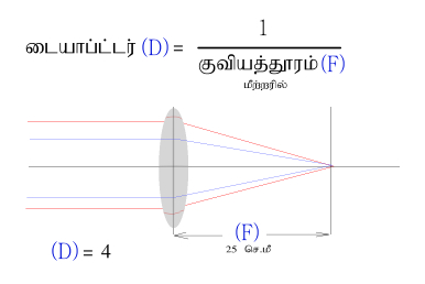 டயொப்ட்டர் பற்றிய விளக்கப் படம். 25 செ.மீ குவியதூர வில்லை ஒன்றின் ஒளி வலுவானது 4 டயொப்ட்டர். இது குவிவு வில்லை எனின் +4 குழிவு வில்லை எனின் -4 .